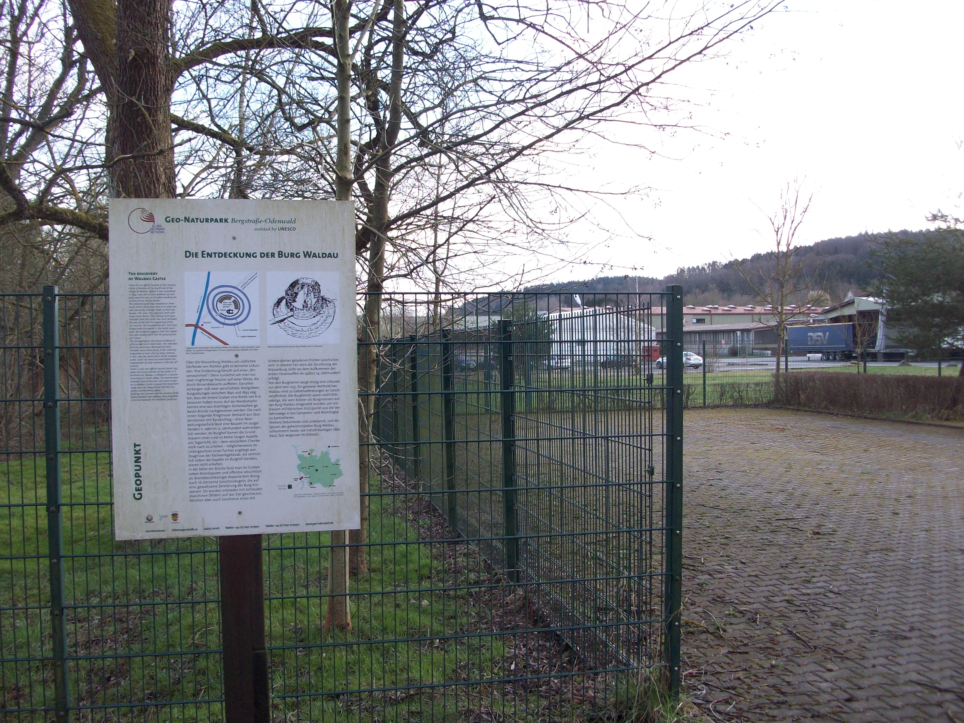 Informationstafel des Geo-Naturparks Bergstaße-Odenwald mit Blick auf das Gelände des Burgstalles